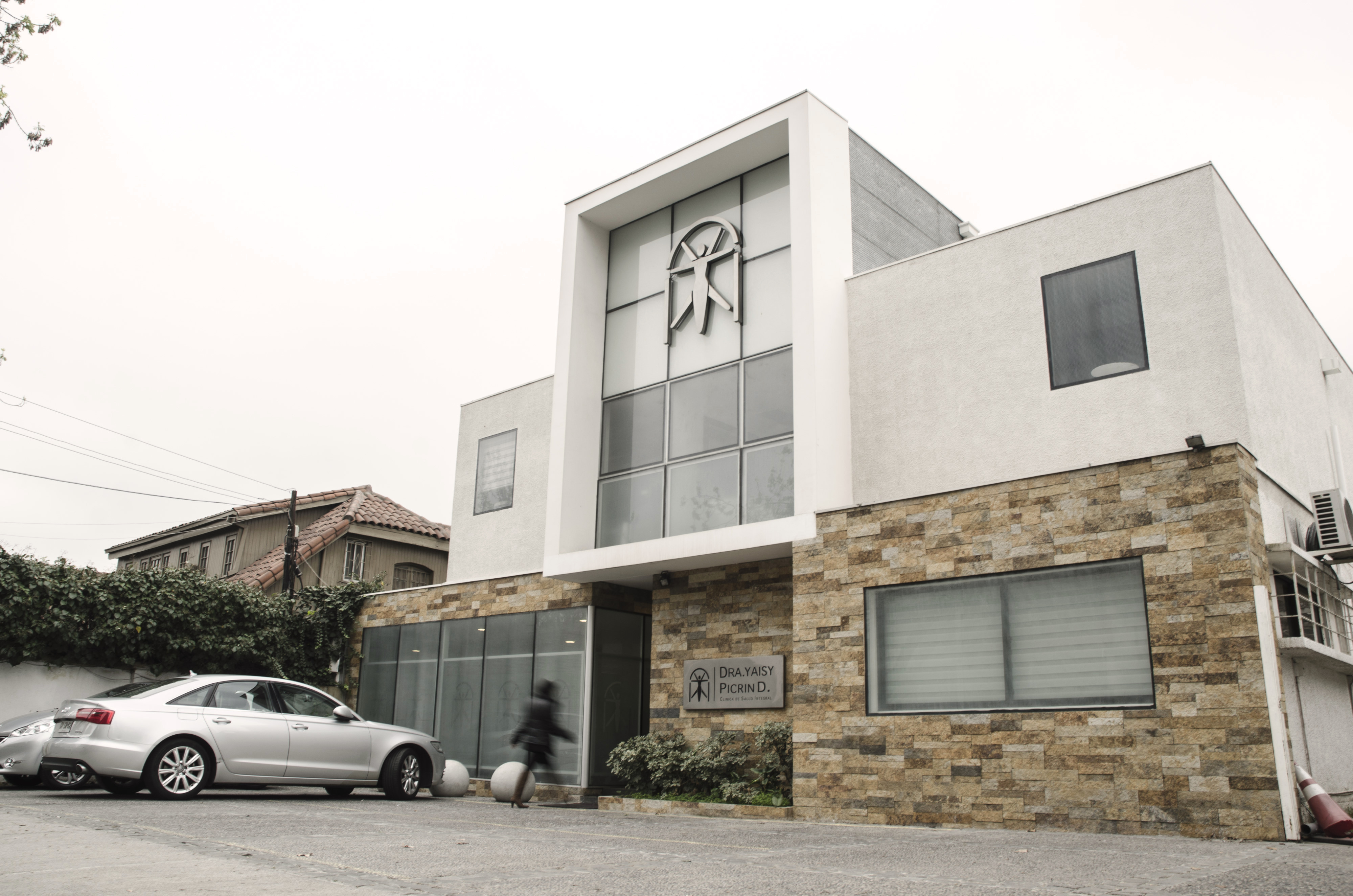 Fachada de la Clínica Picrin de Las Condes